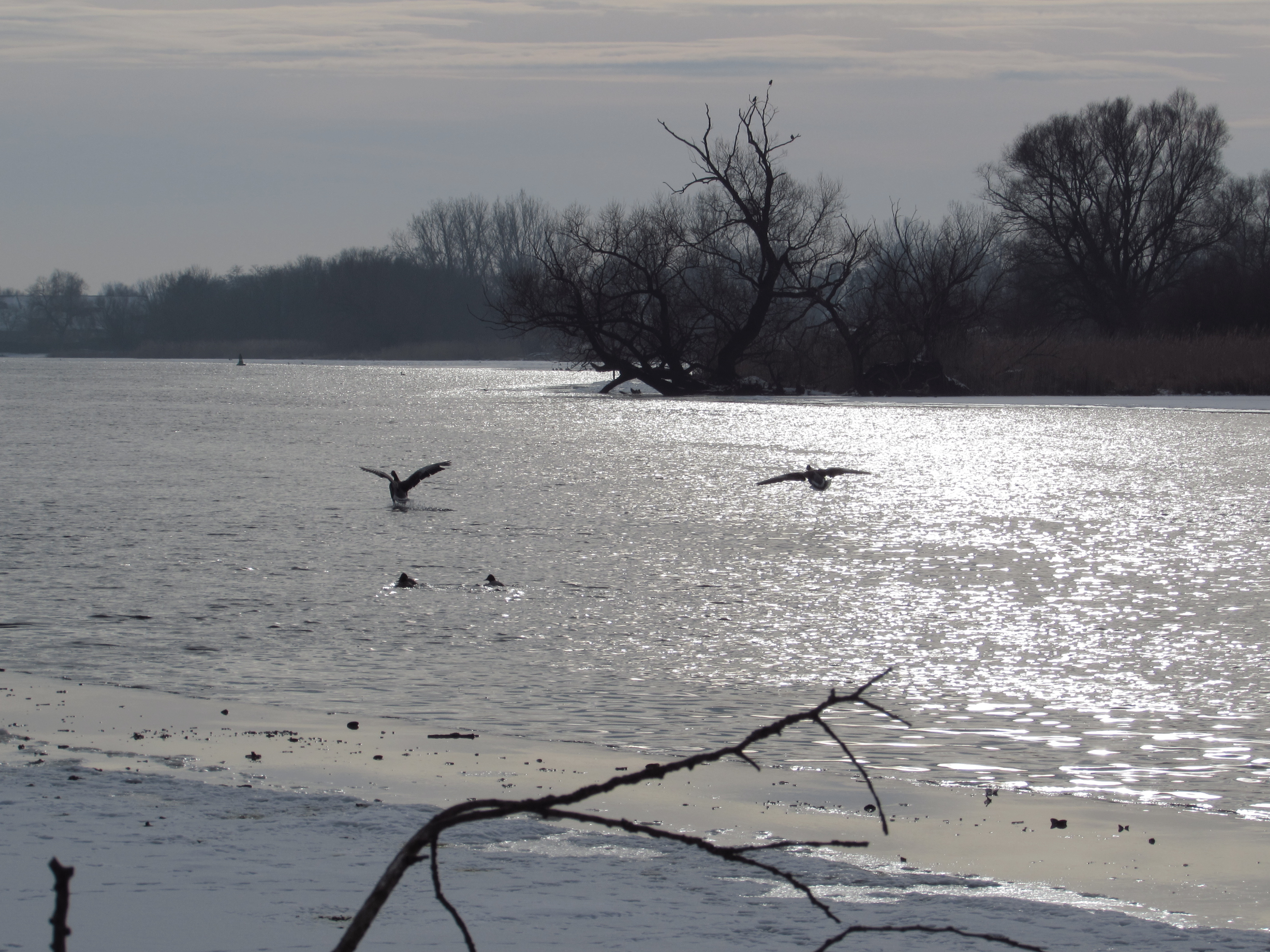 graugänse im naturschutzgebiet untere havel süd bei pritzerbe